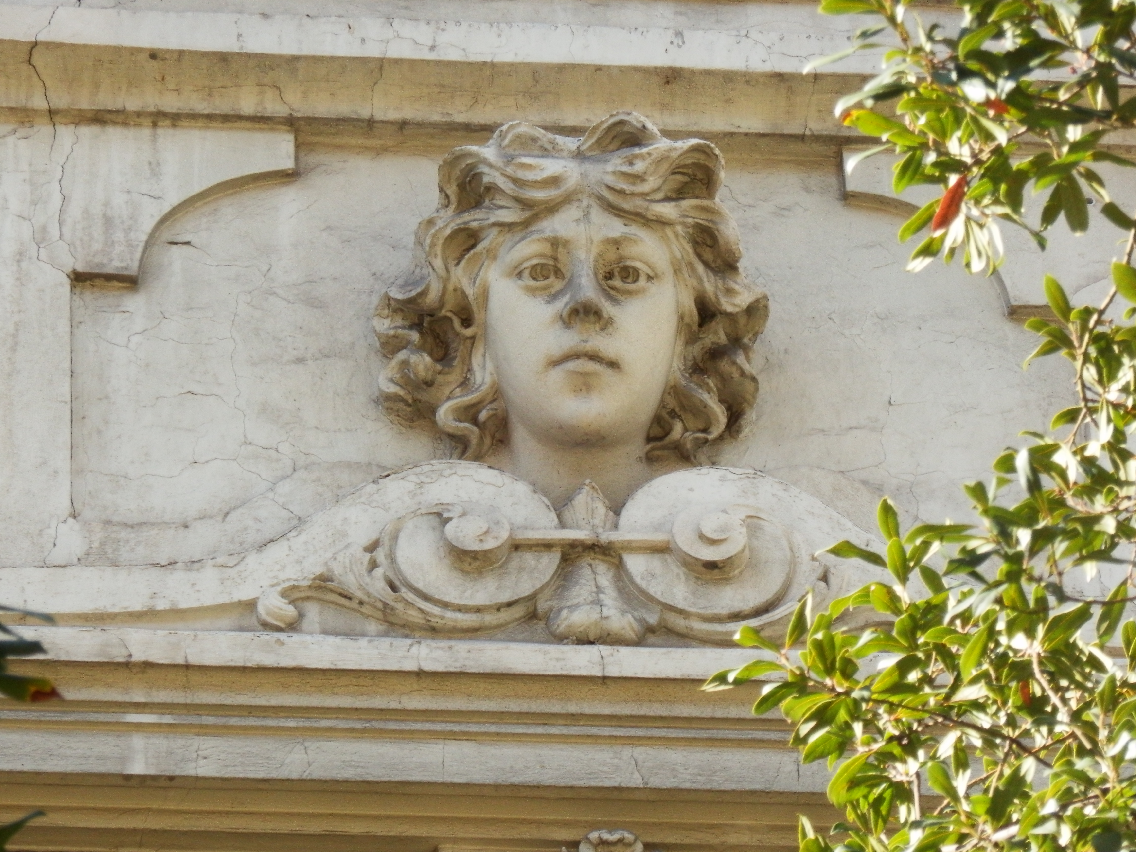 Antigua Clínica del Doctor Lozano en Zaragoza.